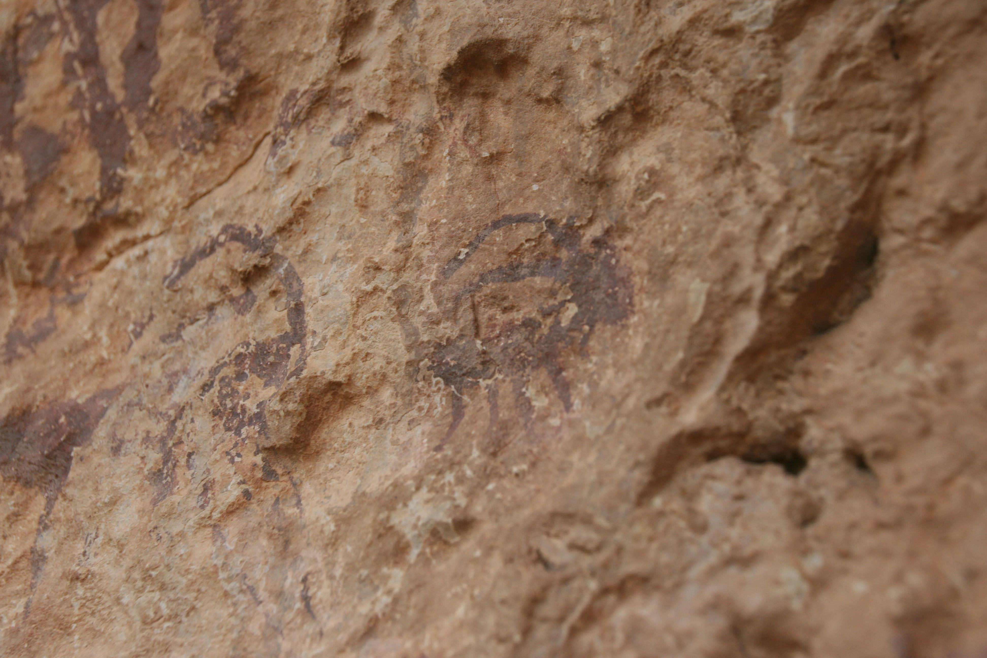 Cueva de los Letreros. Panel 7. Detalle